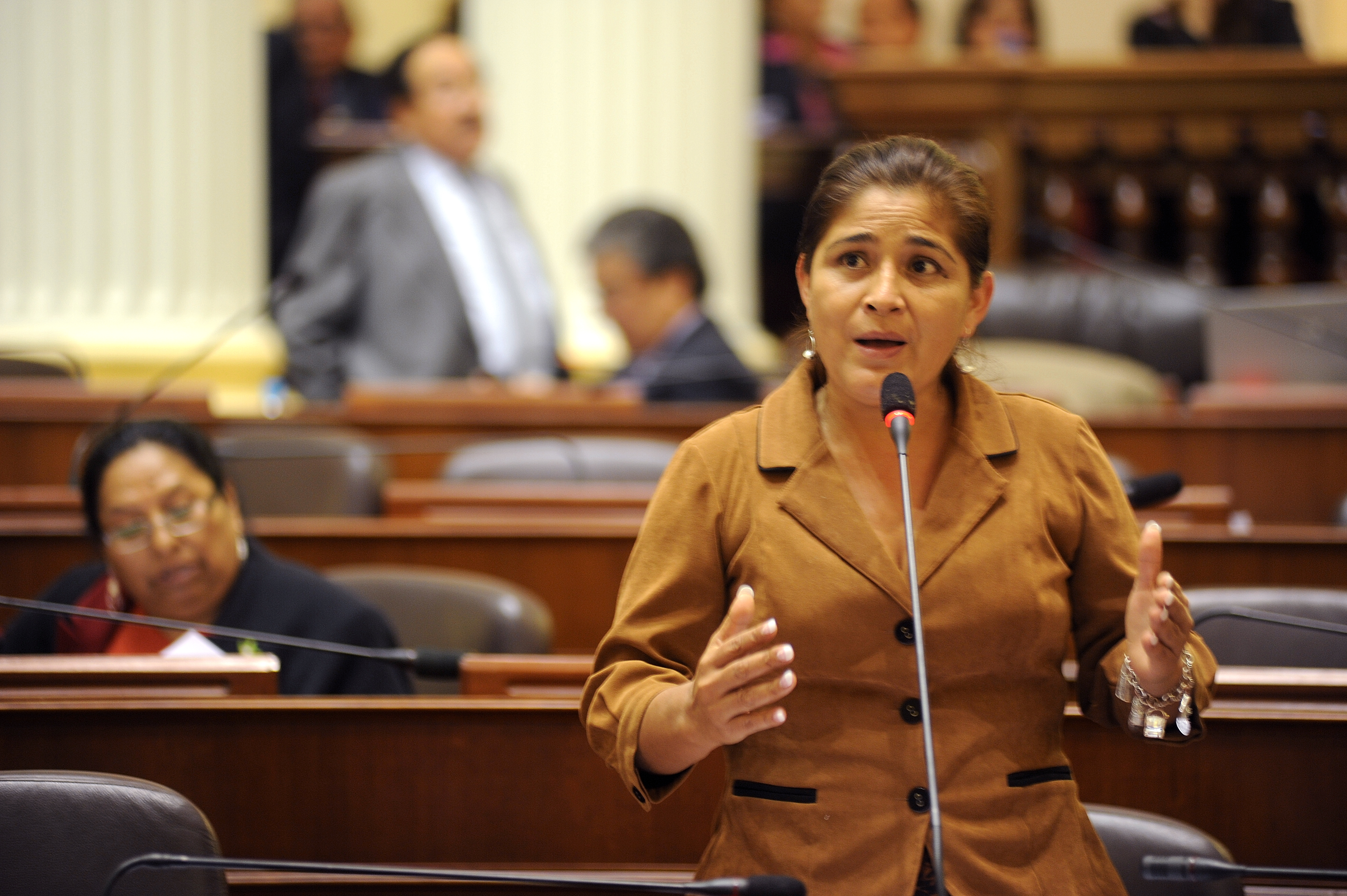 La legisladora Nancy Obregón fija su posición en el debate parlamentario realizado esta tarde por el Pleno.